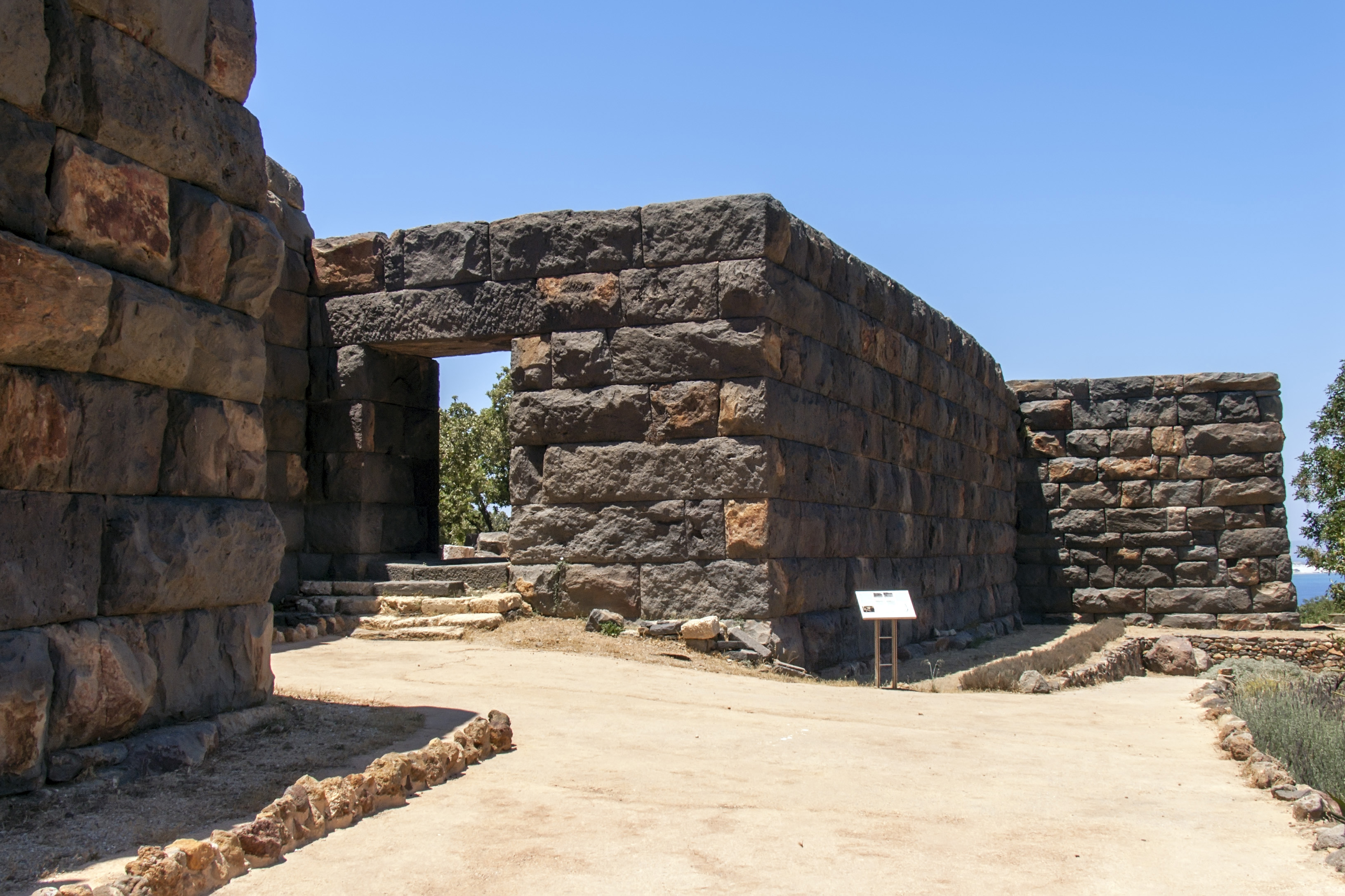 Древняя крепость на острове Нисирос.